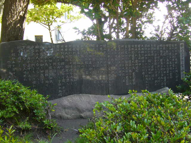 「海ゆかば」石碑1